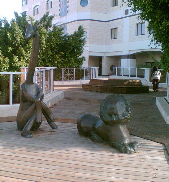 Lion and Giraffe, heroes of the story "Mits Petel" (מיץ פטל), Created by the author, Tamara Rikman, in front of the Schneider children hospital